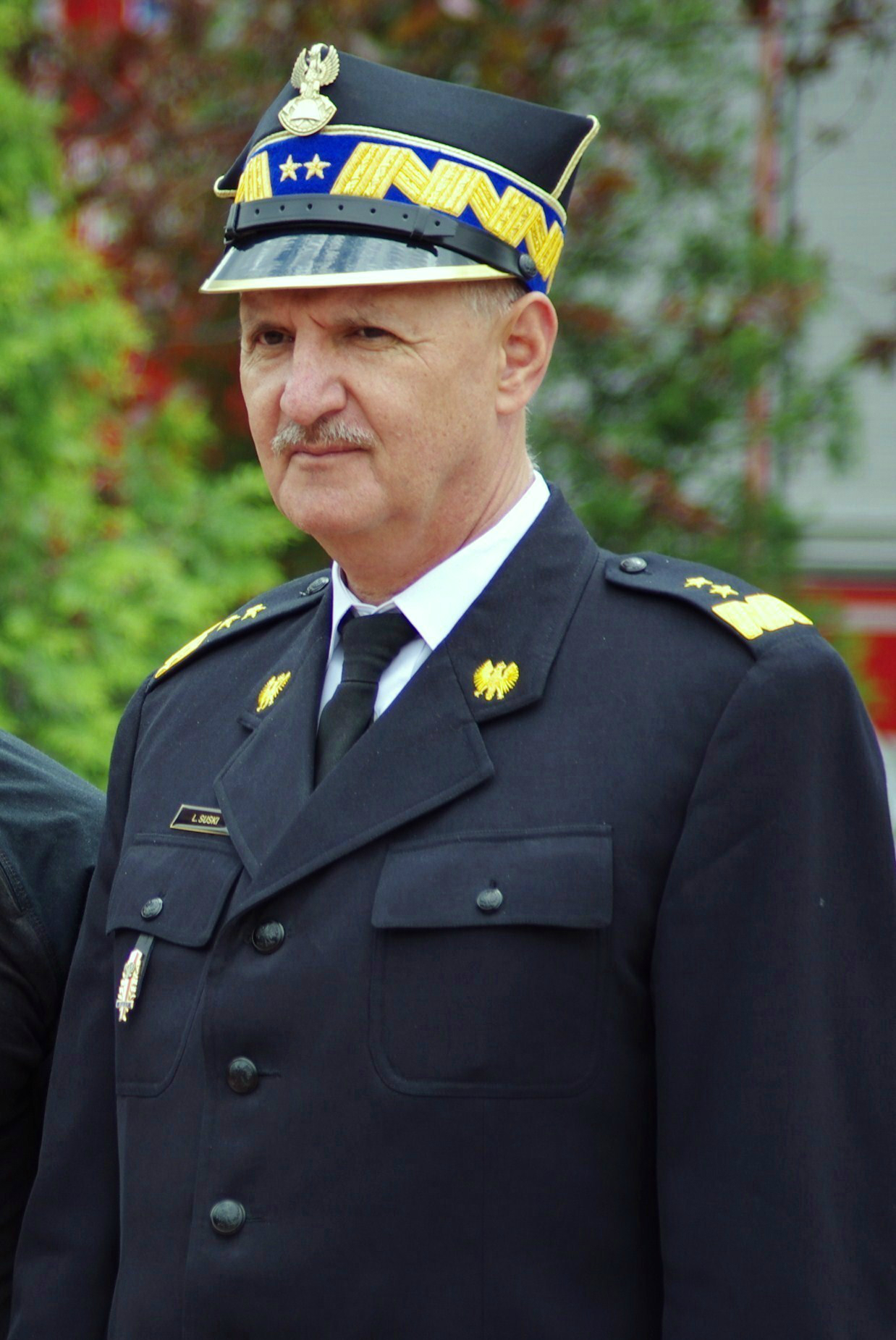 Leszek Suski, strażak, generał brygadier, komendant główny Państwowej Straży Pożarnej.